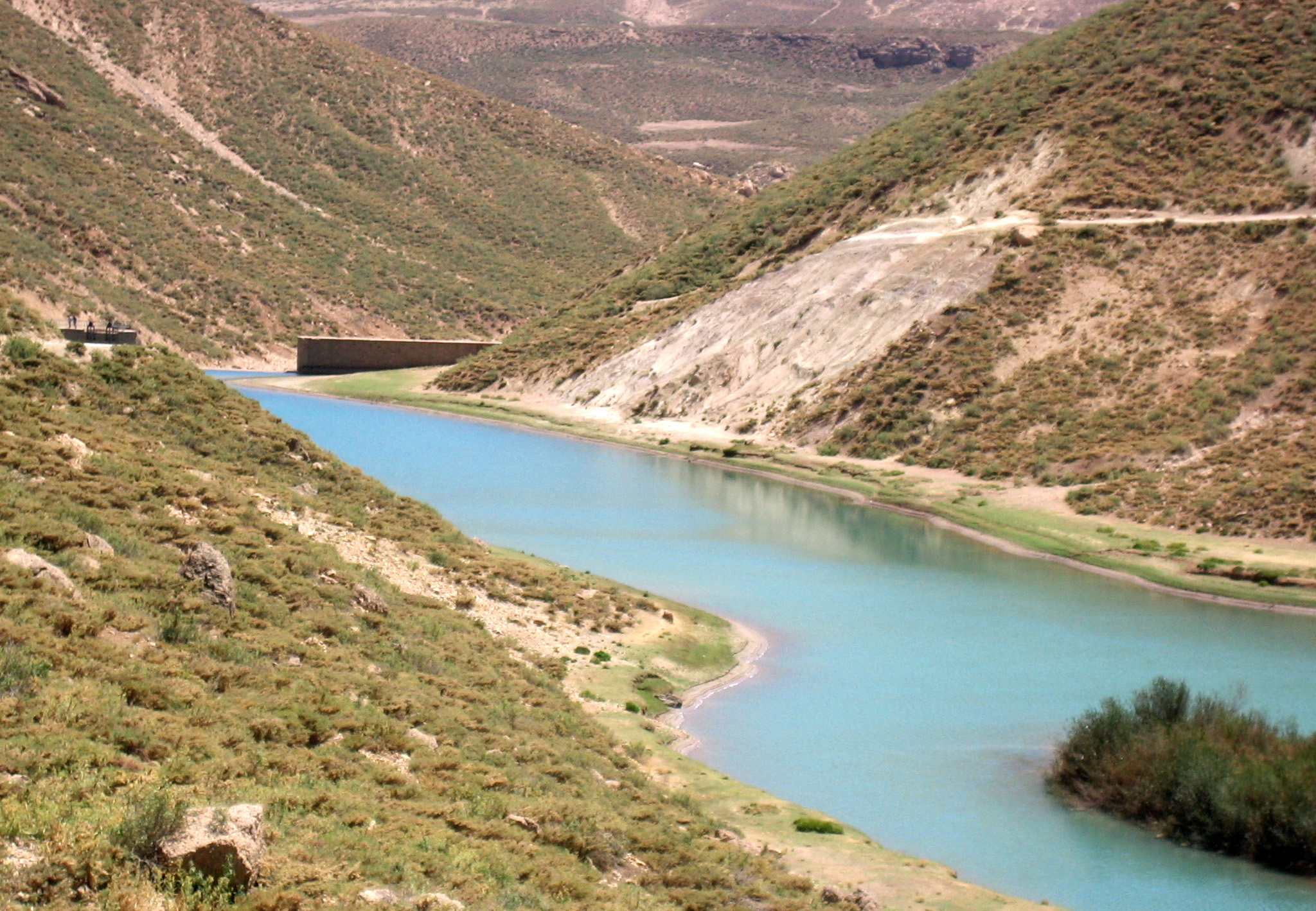 سد كوهرنگ تابستان 86